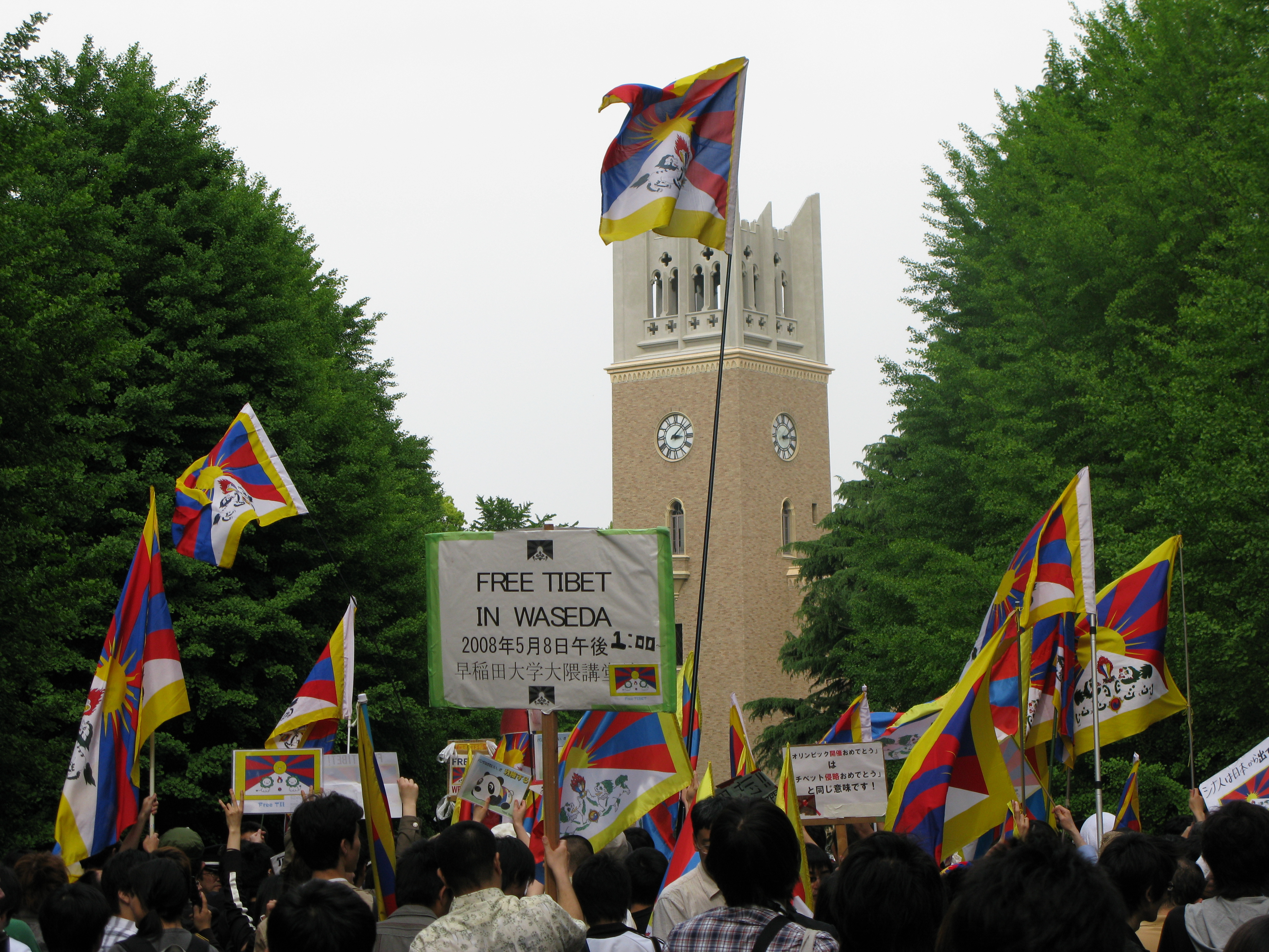 Wikipedia 10 Rennes